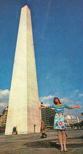 Marta Minujin. Instituto Di Tella. Buenos Aires 1966-1967. Antes del hapenning: Marta Minujin tira helados sobre el obelisco y otros los lamen.